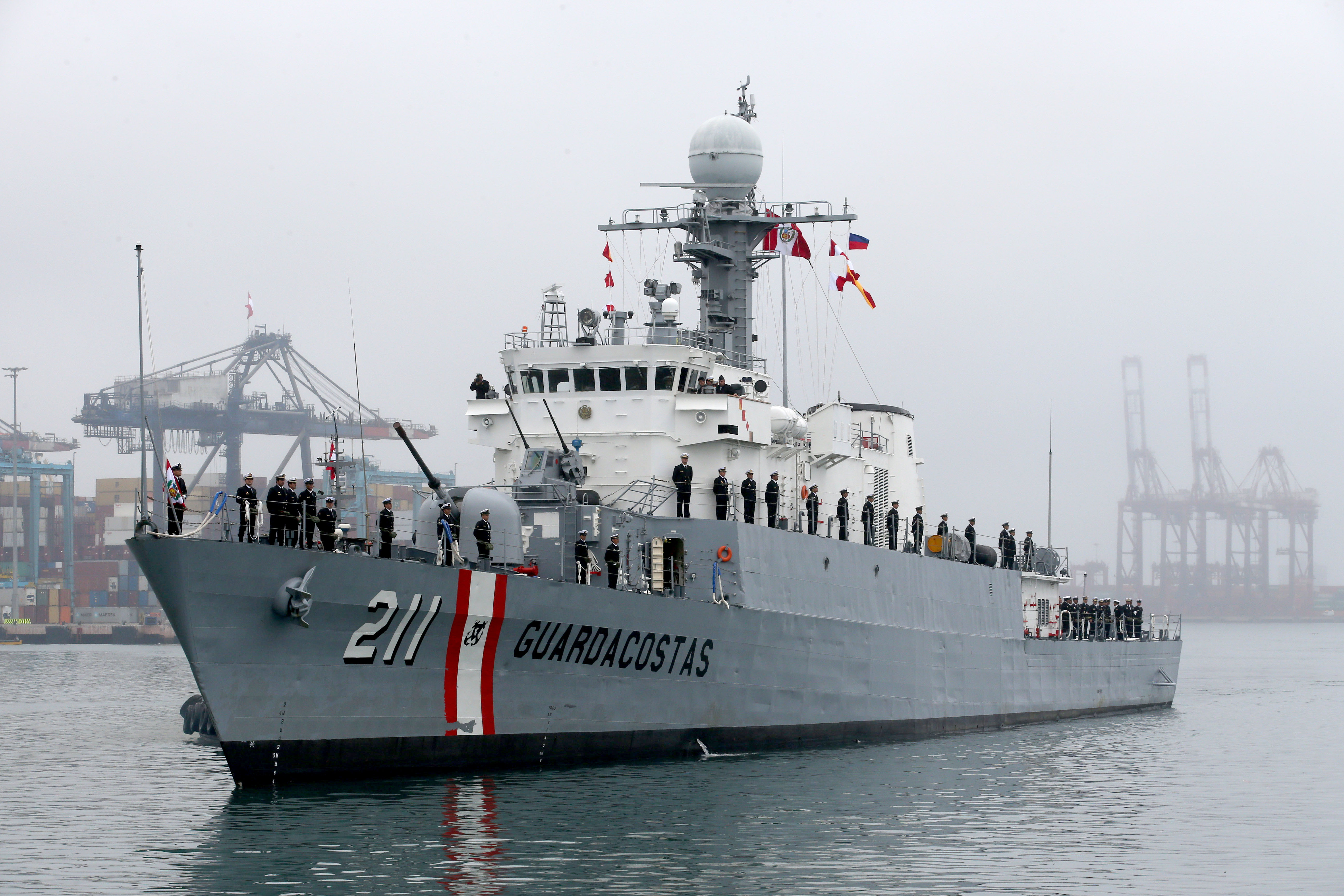 Incorporación del BAP FERRÉ a la Marina de Guerra del Perú